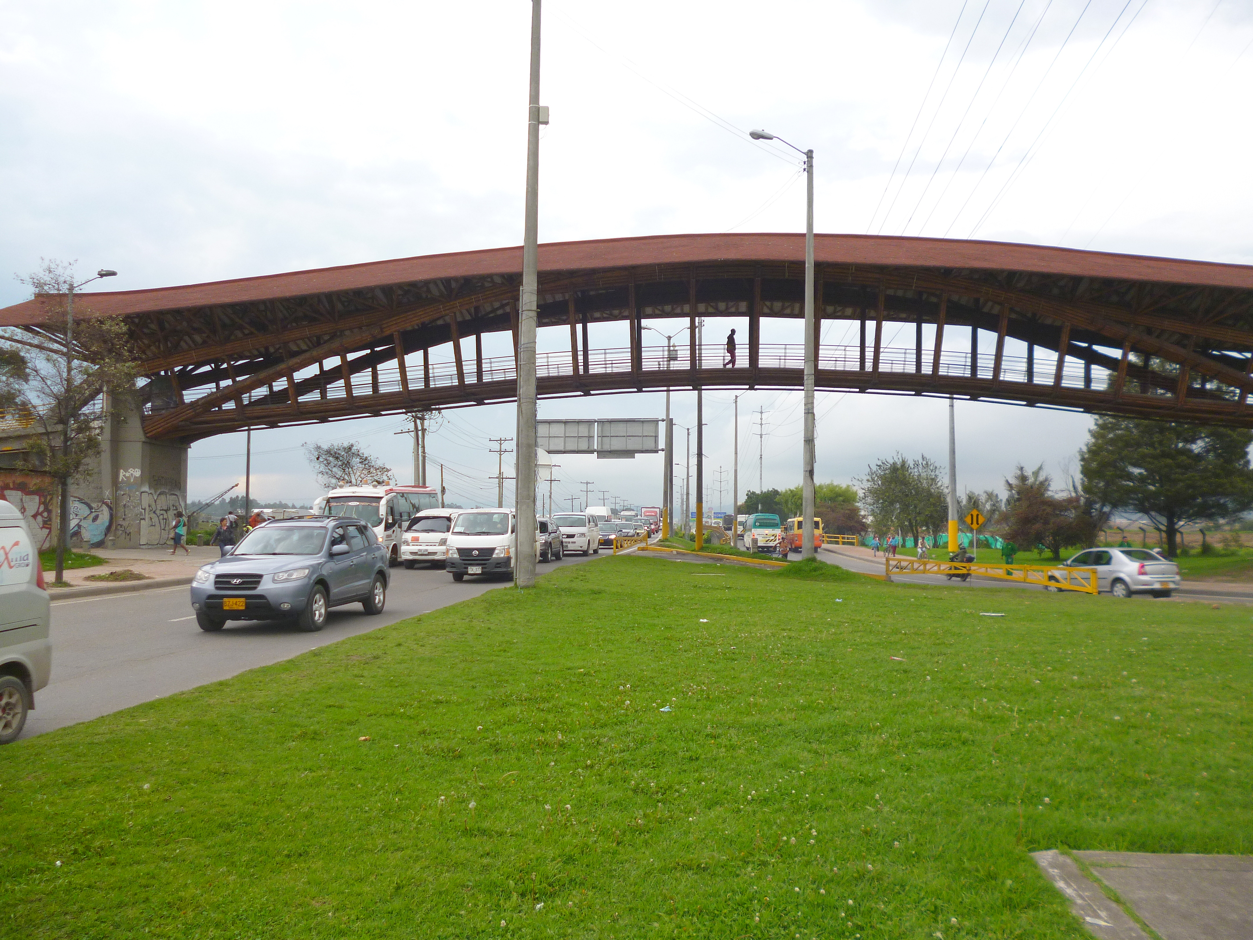 Toma Completa del puente.